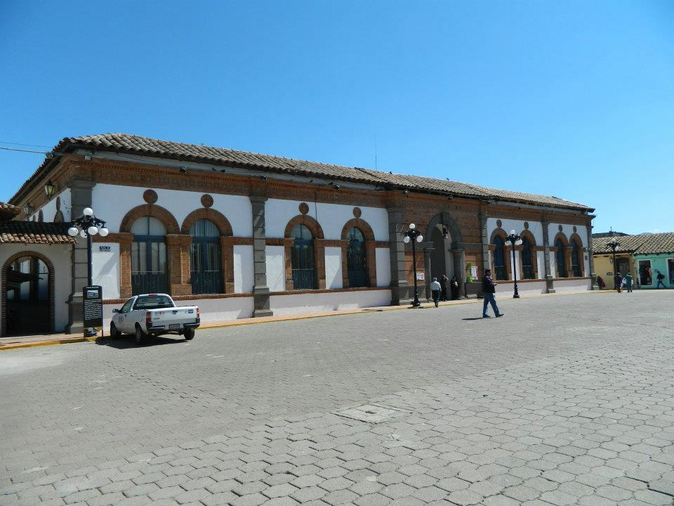 Palacio Municipal